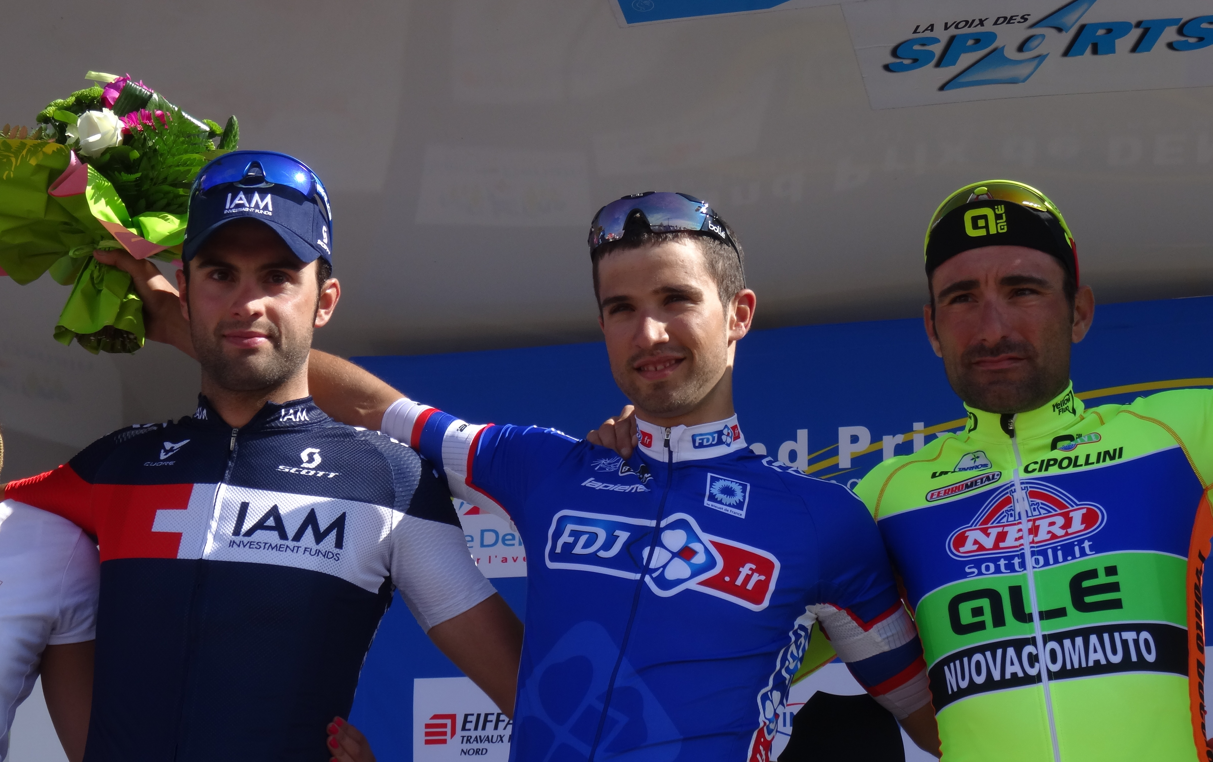 Reportage réalisé le jeudi 17 avril à l'occasion du départ et de l'arrivée du Grand Prix de Denain 2014 à Denain, Nord, Nord-Pas-de-Calais, France.